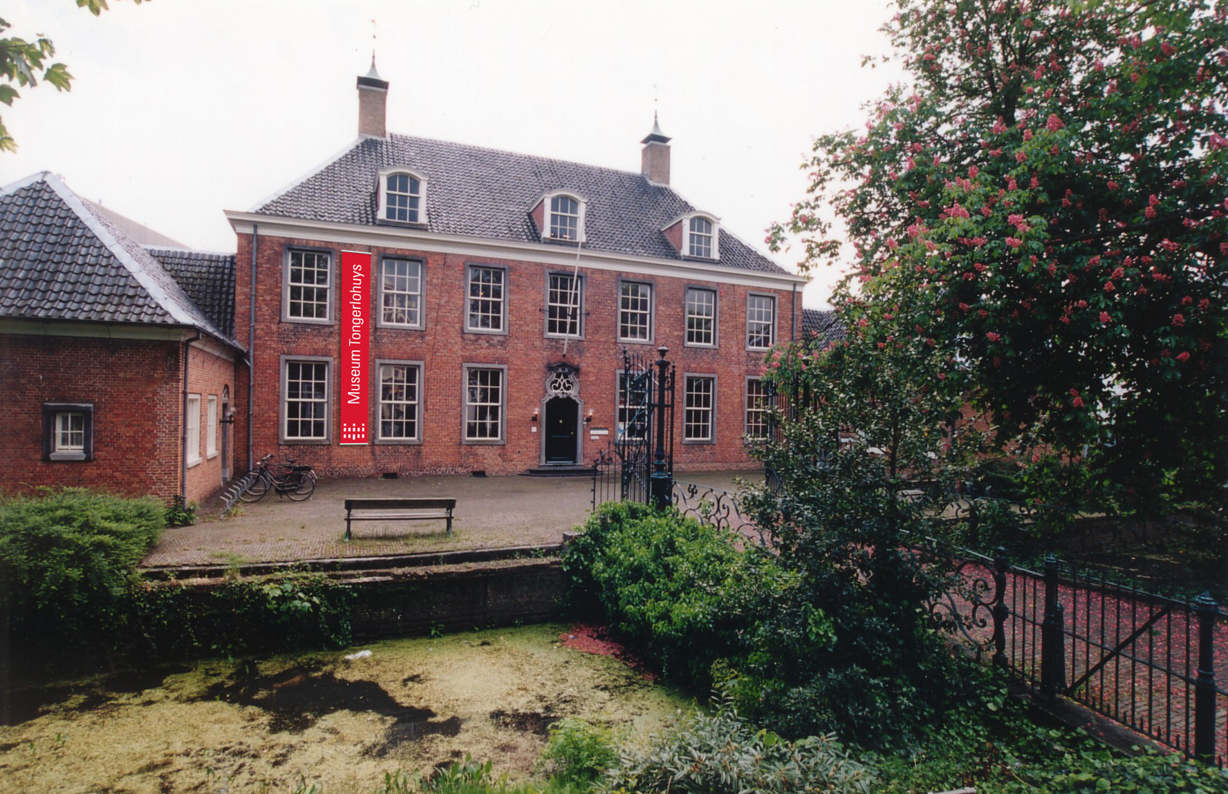 Museum Tongerlohuys: een oase van rust in een druk stadscentrum.